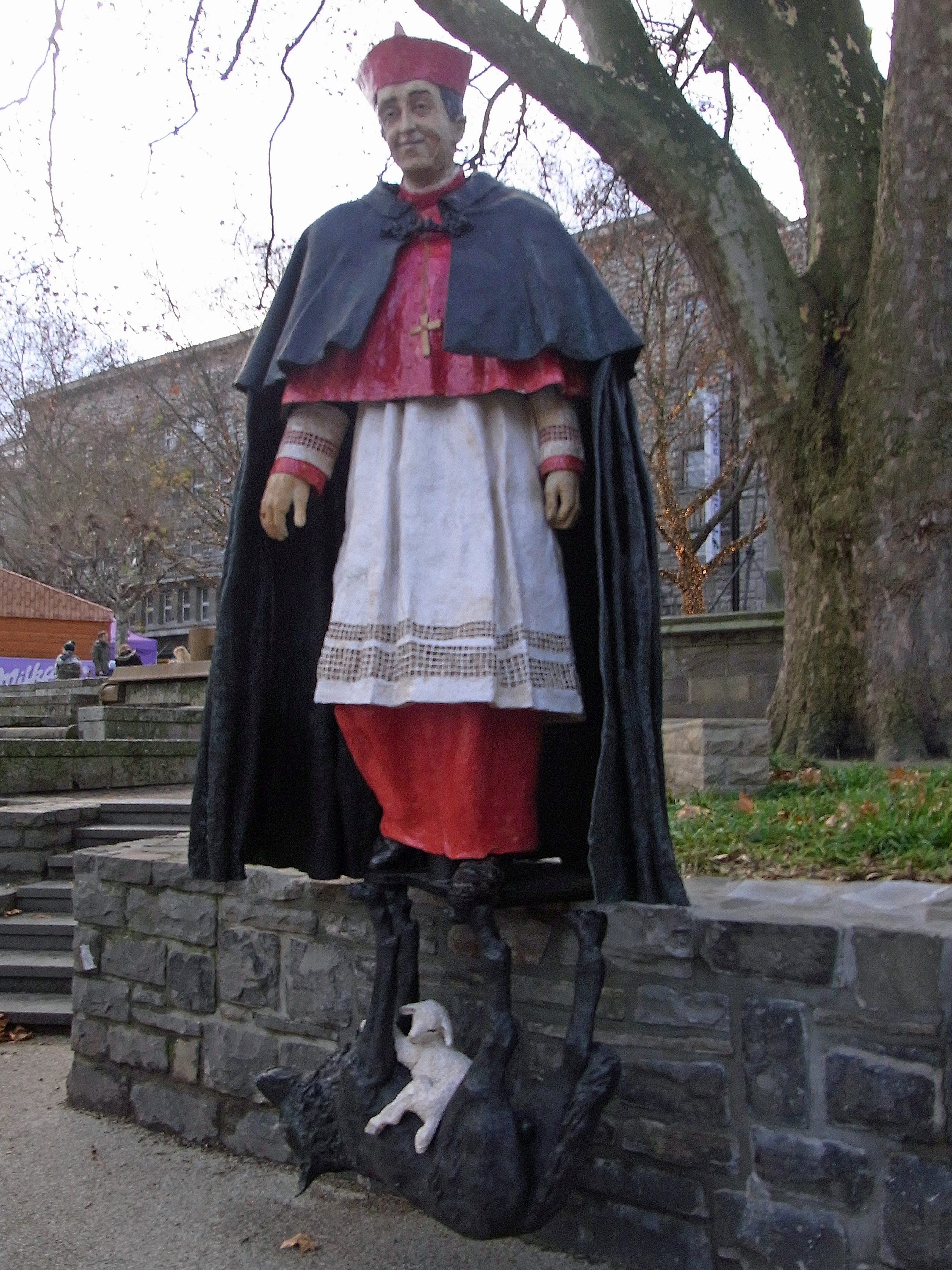 Burgplatz (Essen): Denkmal für Kardinal Franz Hengsbach von Silke Rehberg